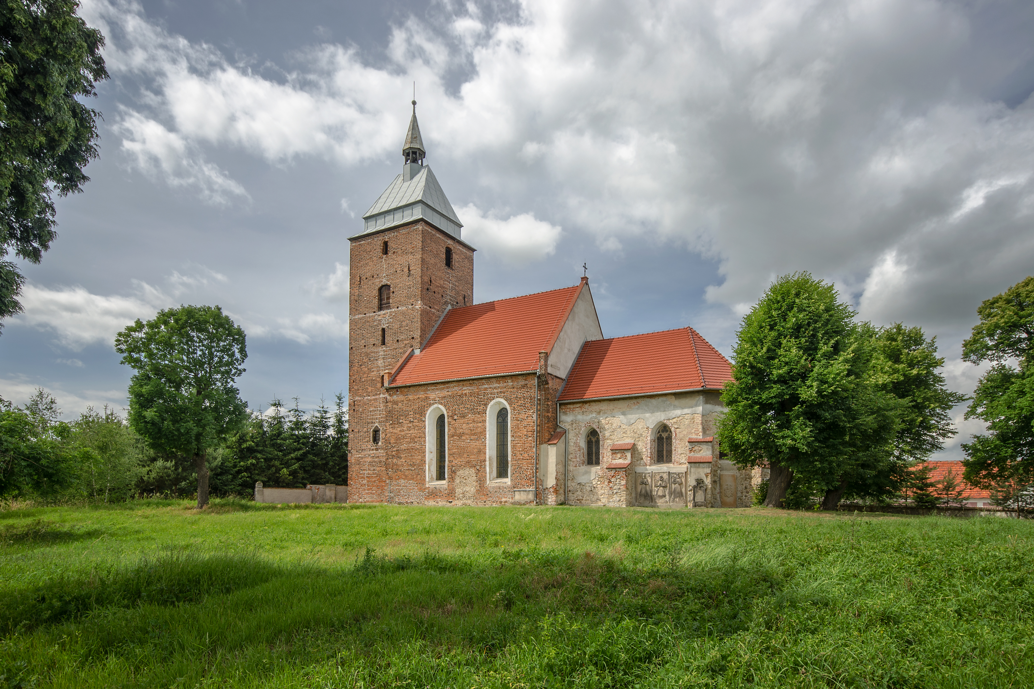 Rosochata, kościół fil. p.w. Wniebowzięcia NMP, 1517, 2 poł. XVII, 4 ćw. XIX